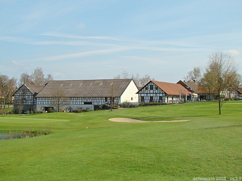 Gutshof in Zimmerhof, von Golfplatz umgeben